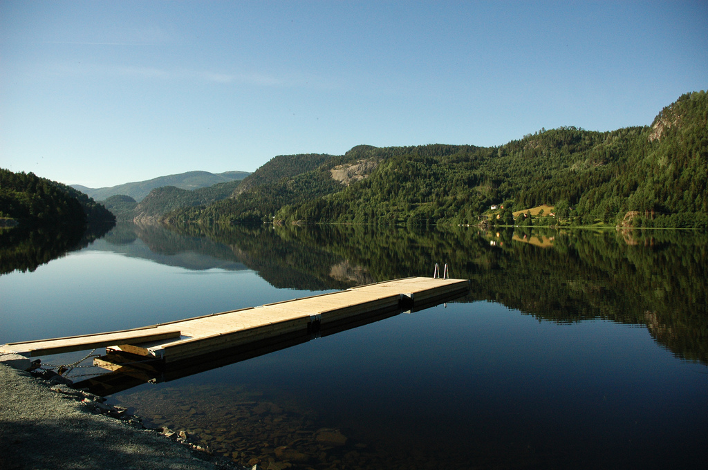 Kviteseidvatnet